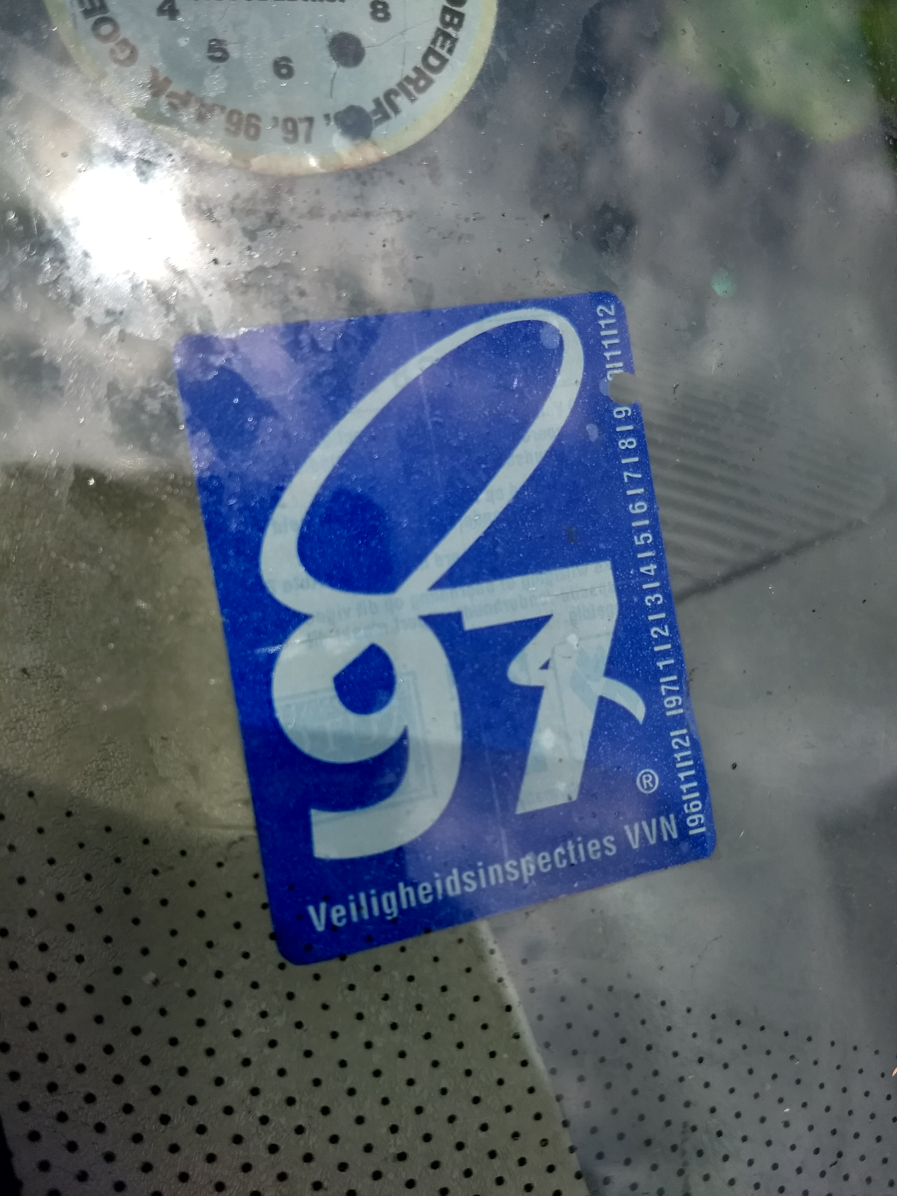 Een achter de voorruit geplaatste goedkeuringskrul uit 1997, na een geslaagde veiligheidsinspectie door Veilig Verkeer Nederland